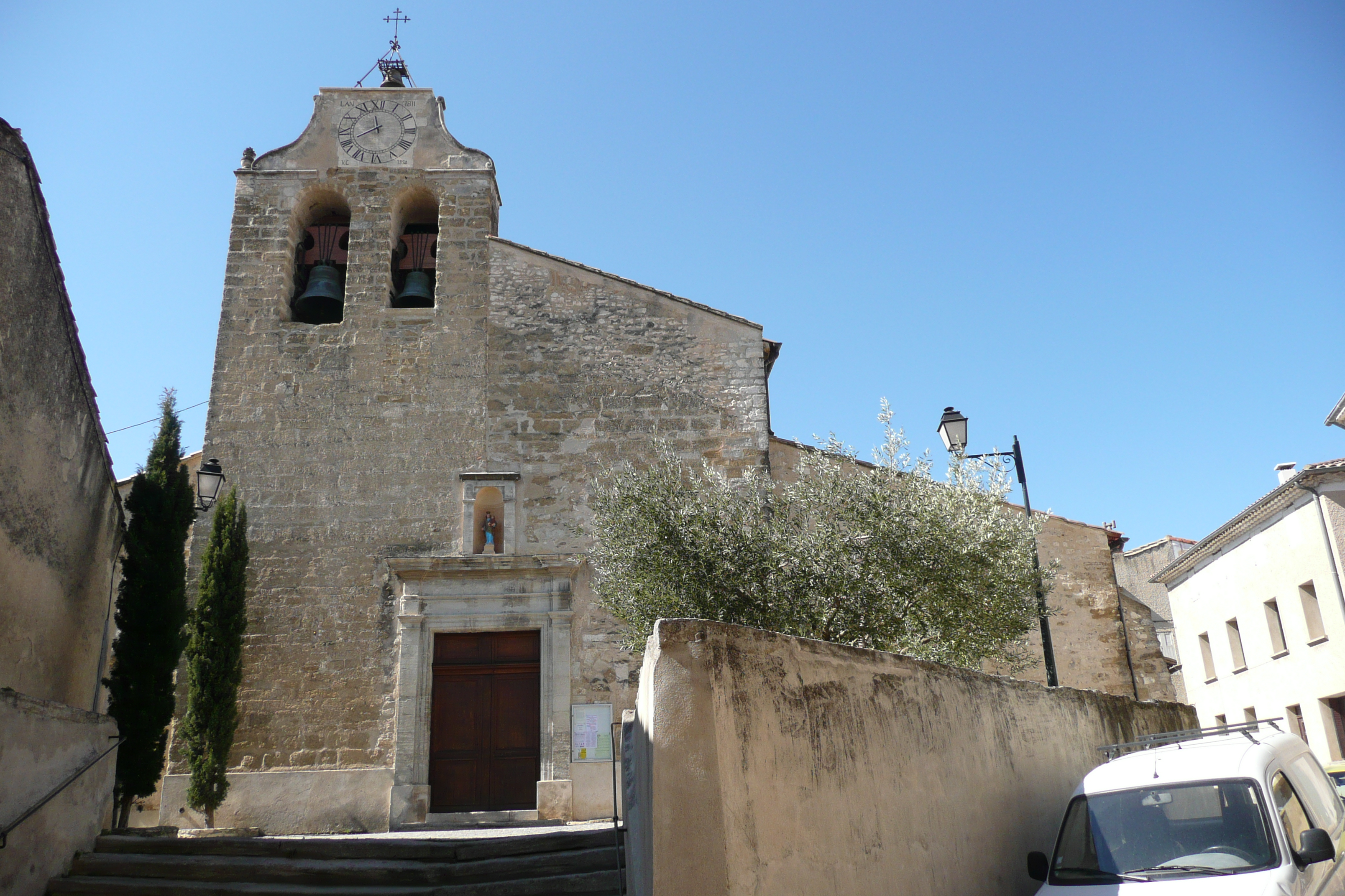 Eglise à Saint Saturnin lès Avignon.